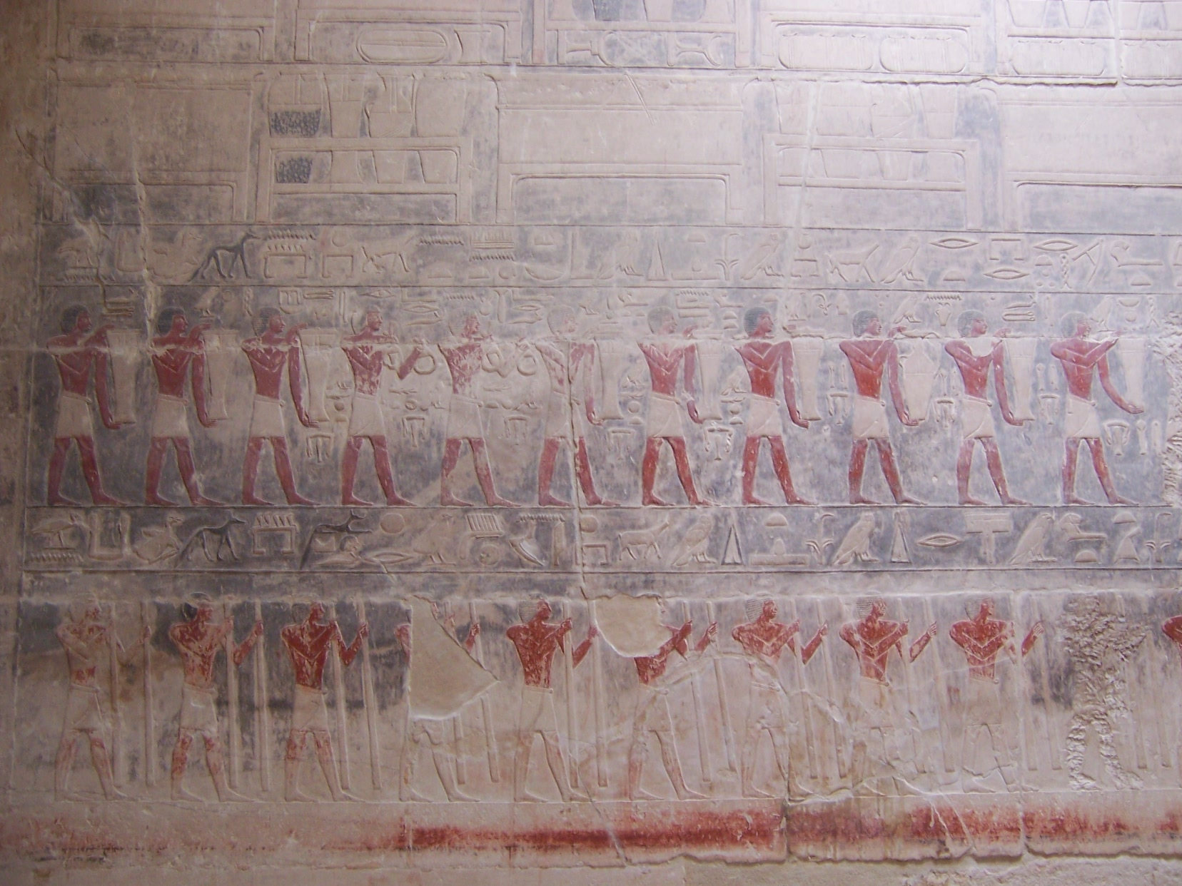 Pictures from Saqqara, Egypt